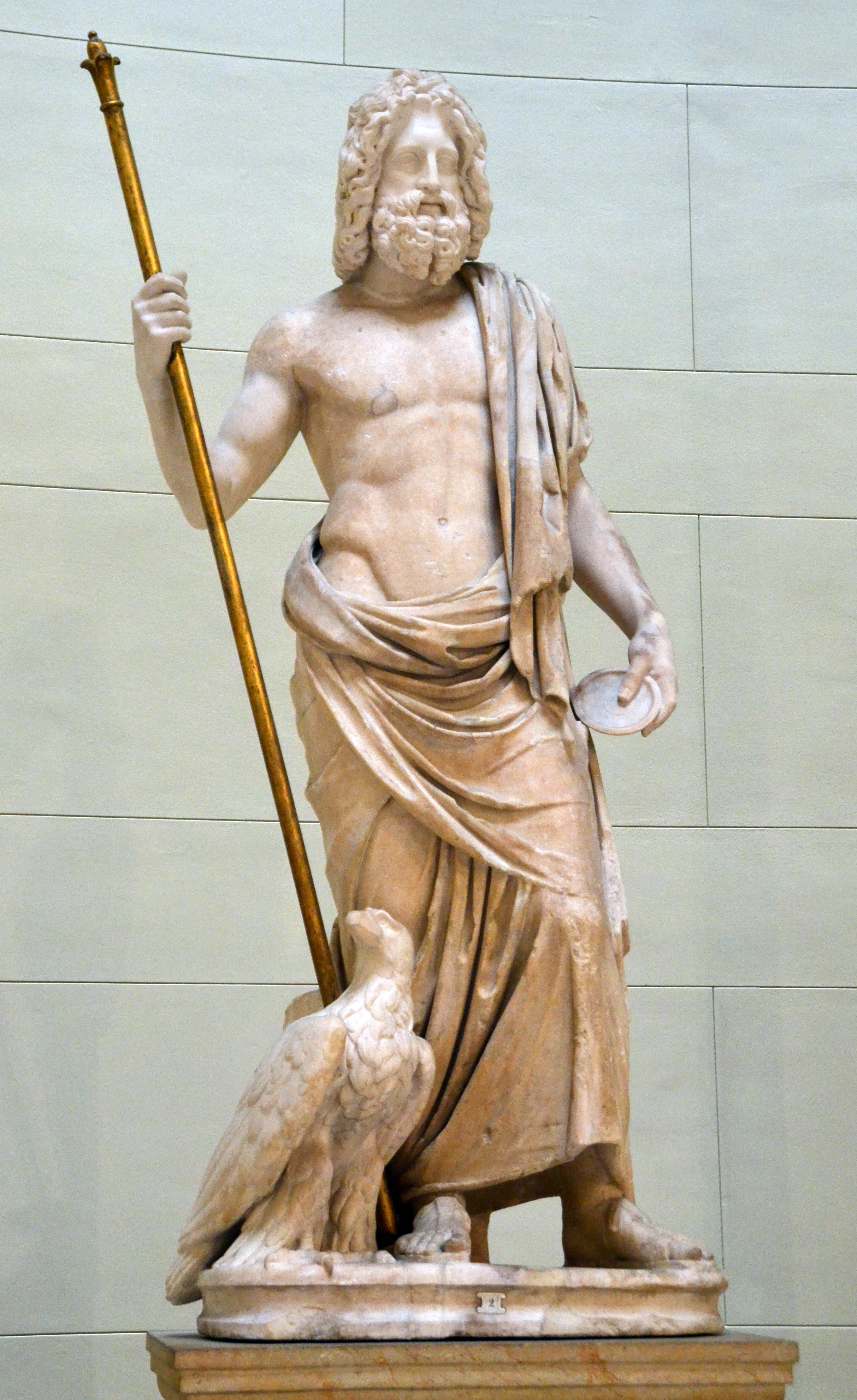 Zeus and his eagle. Antikensammlung Berlin.